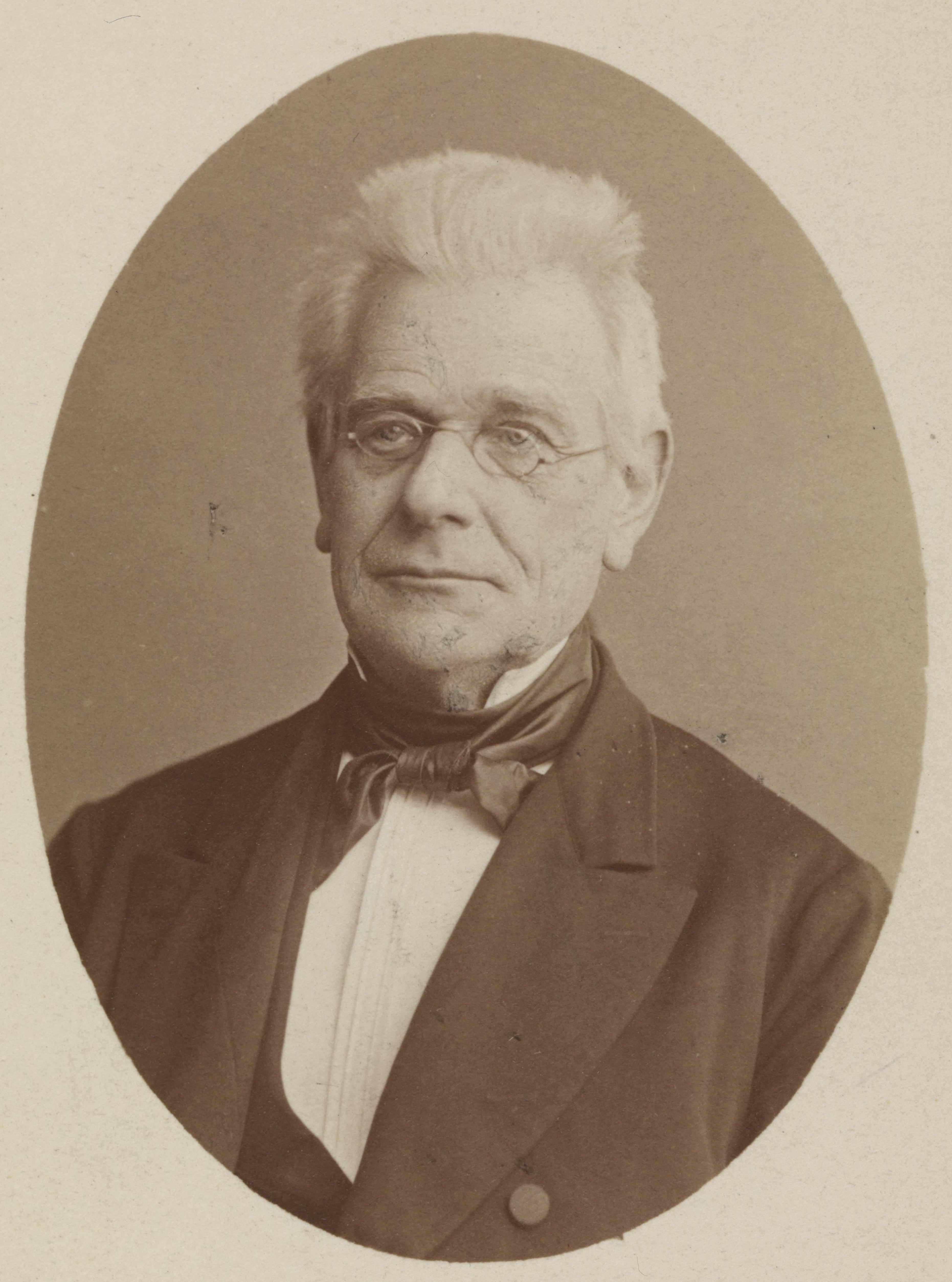 Bildet er hentet fra Nasjonalbibliotekets bildesamling Depicted person: Hansteen, Philip Henrik